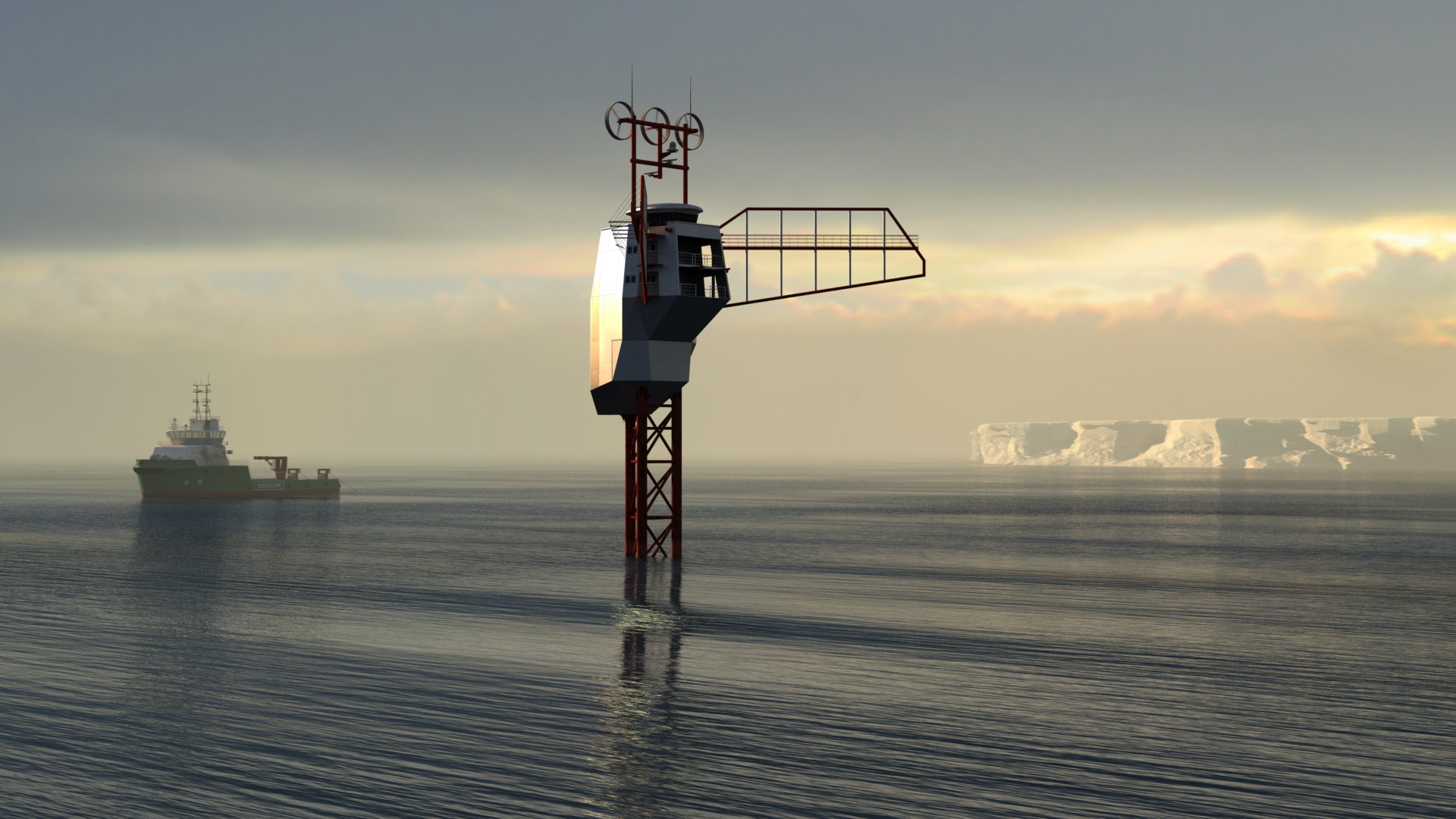 Départ de la dérive